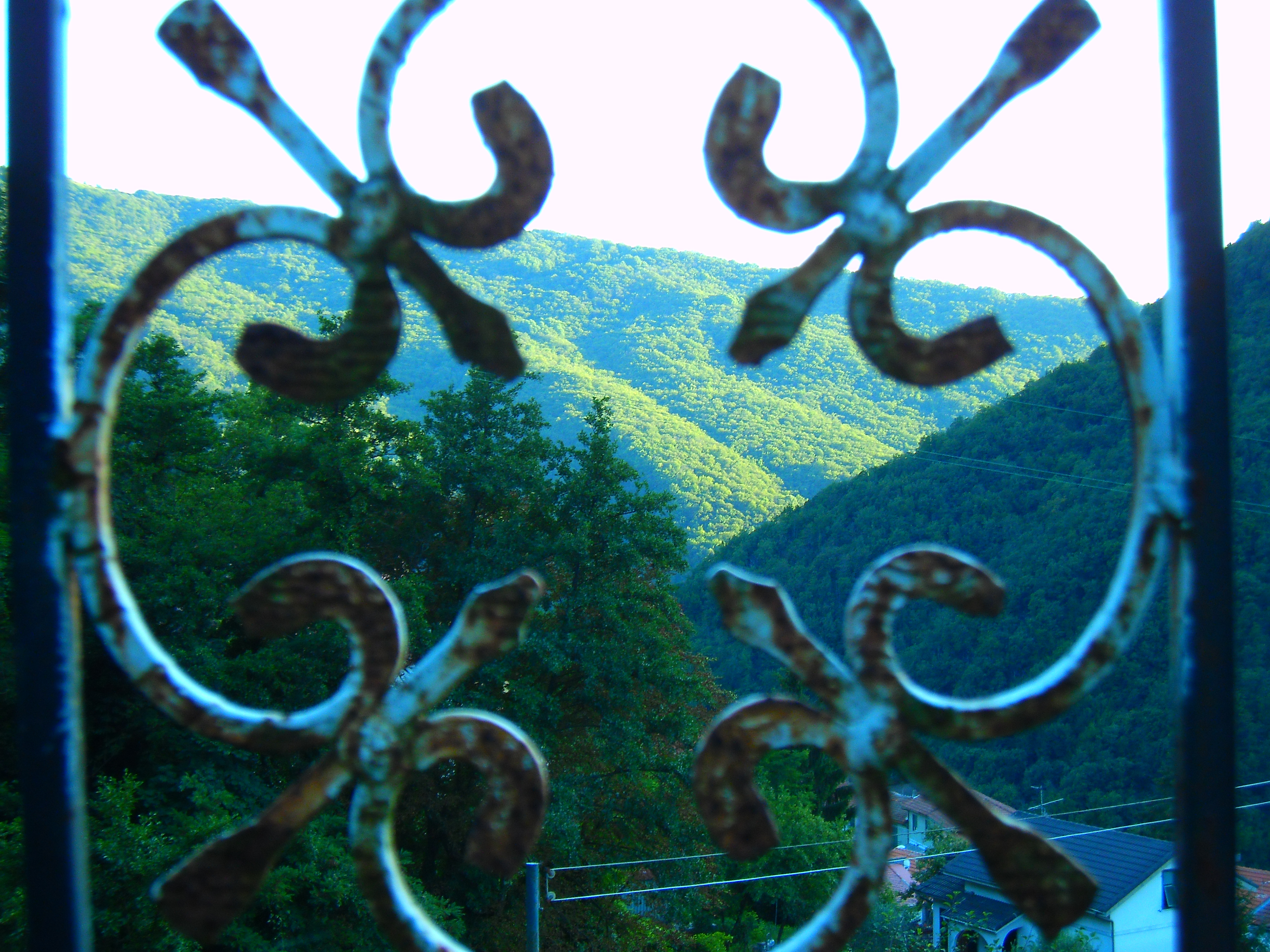 Panorama von Bargagli, fotografiert durch einen Zaun.